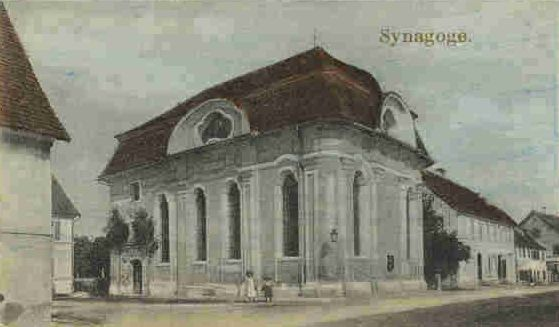 Auschnitt mit Synagoge aus einer Ansischtskarte von Altenstadt (Iller)